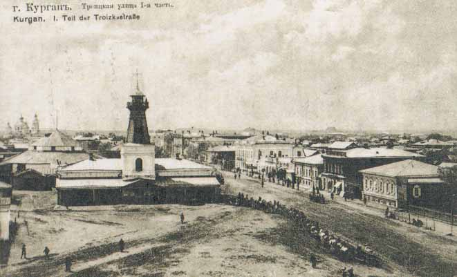 Троицкая улица в г. Кургане